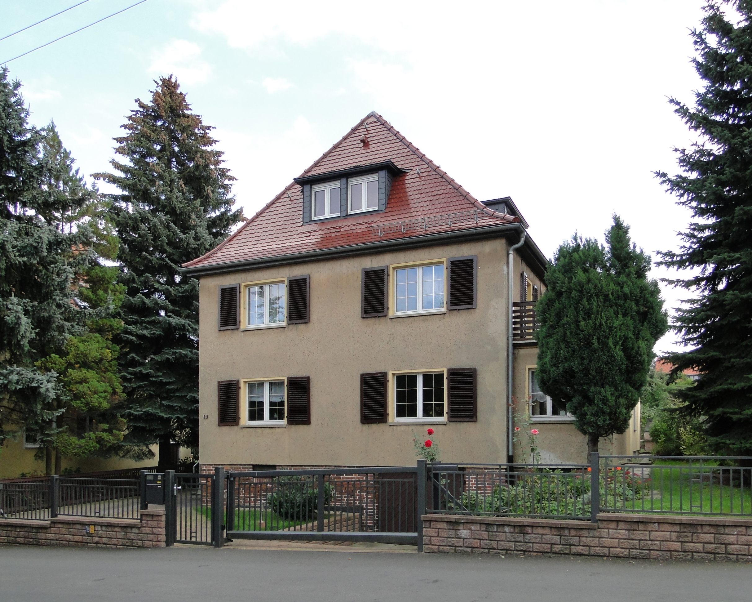 Haus Martin-Opitz-Straße 19 in Dresden-Omsewitz, Wohnhaus von Lina Franziska Fehrmann